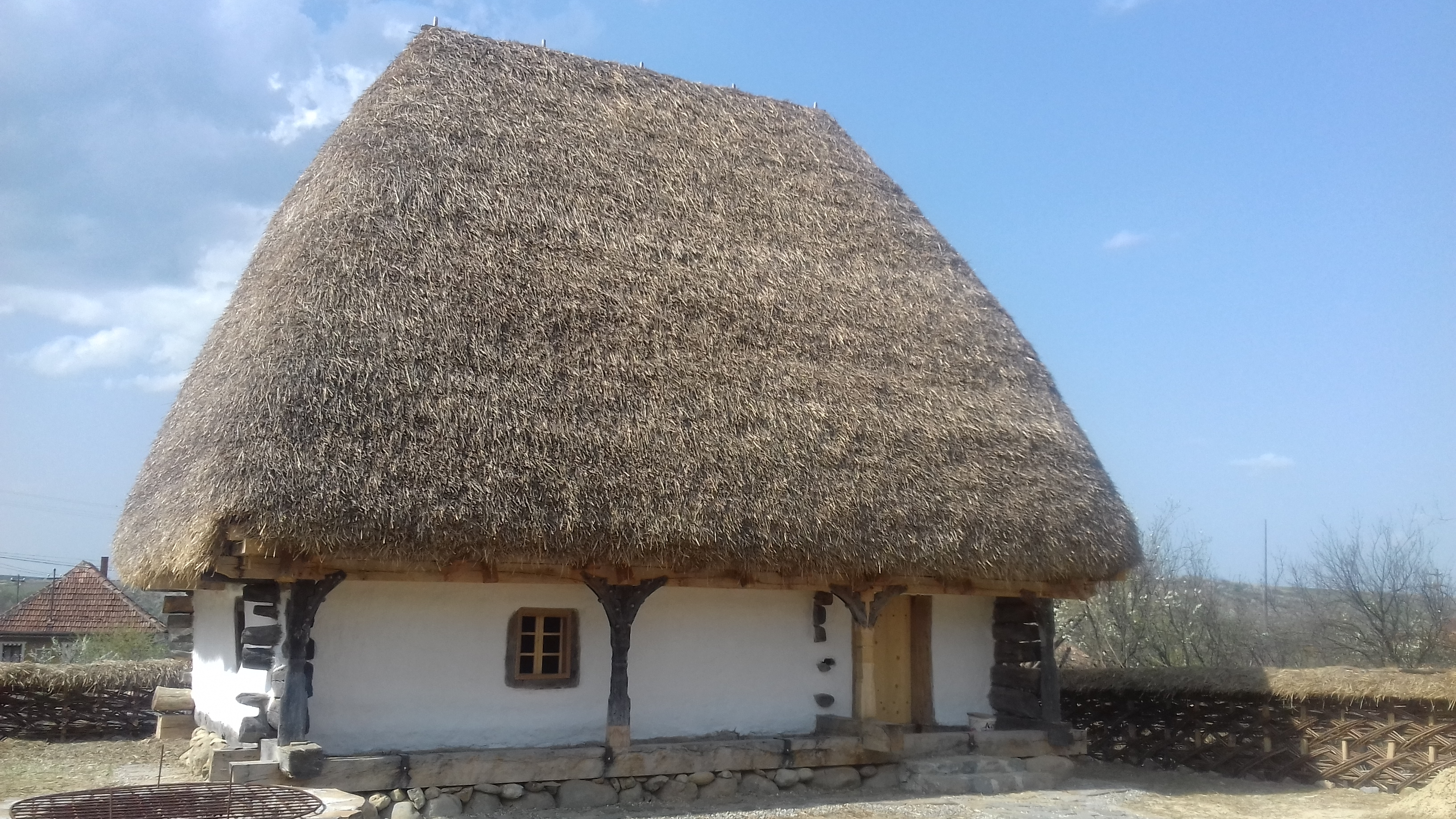 Casa Lupuț - Muzeul din Cizer (secolul XVIII)